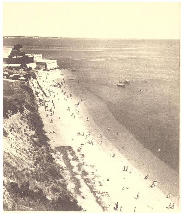 Praia de albarquel nos meados do séc. XX